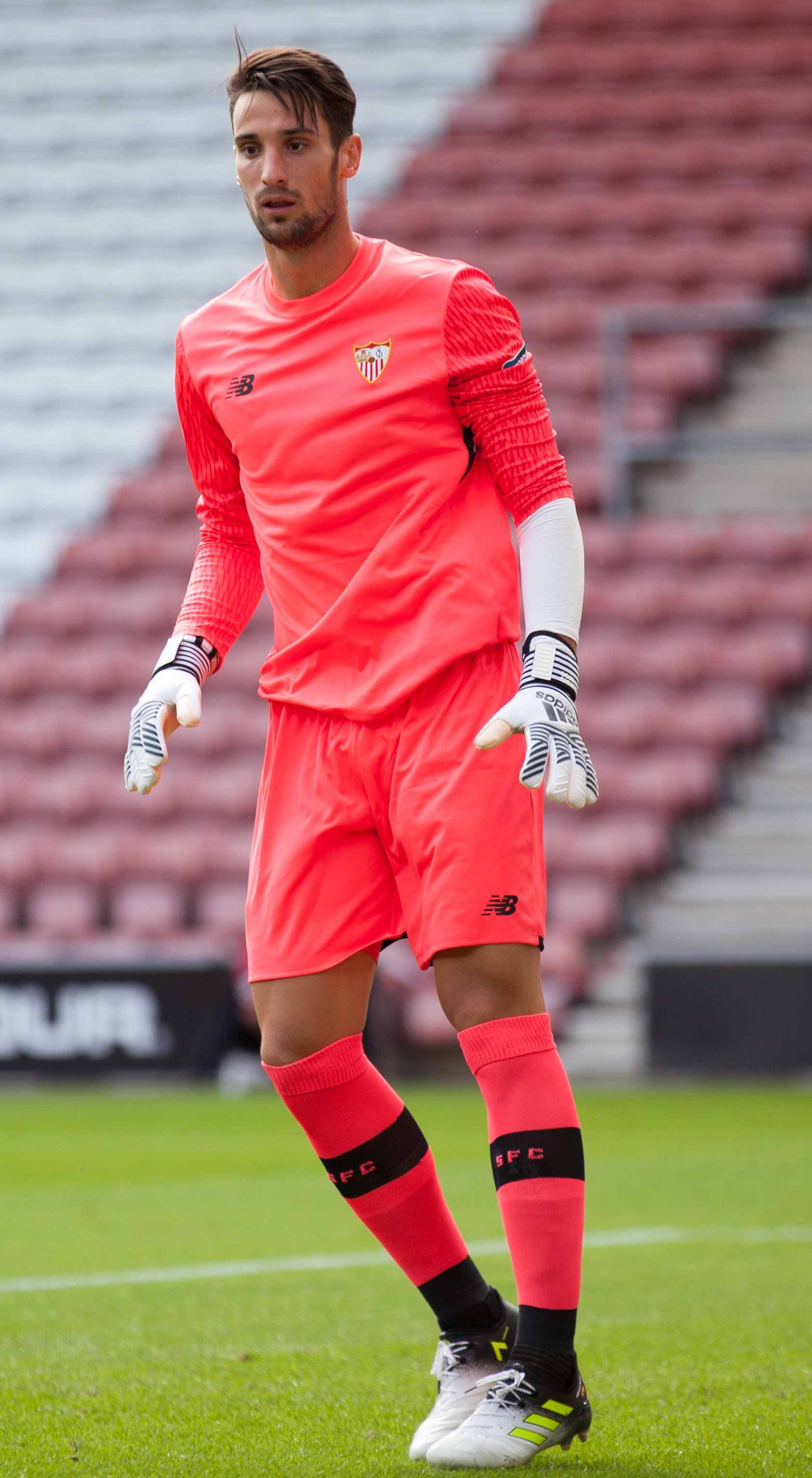 Image by Steve Hogg